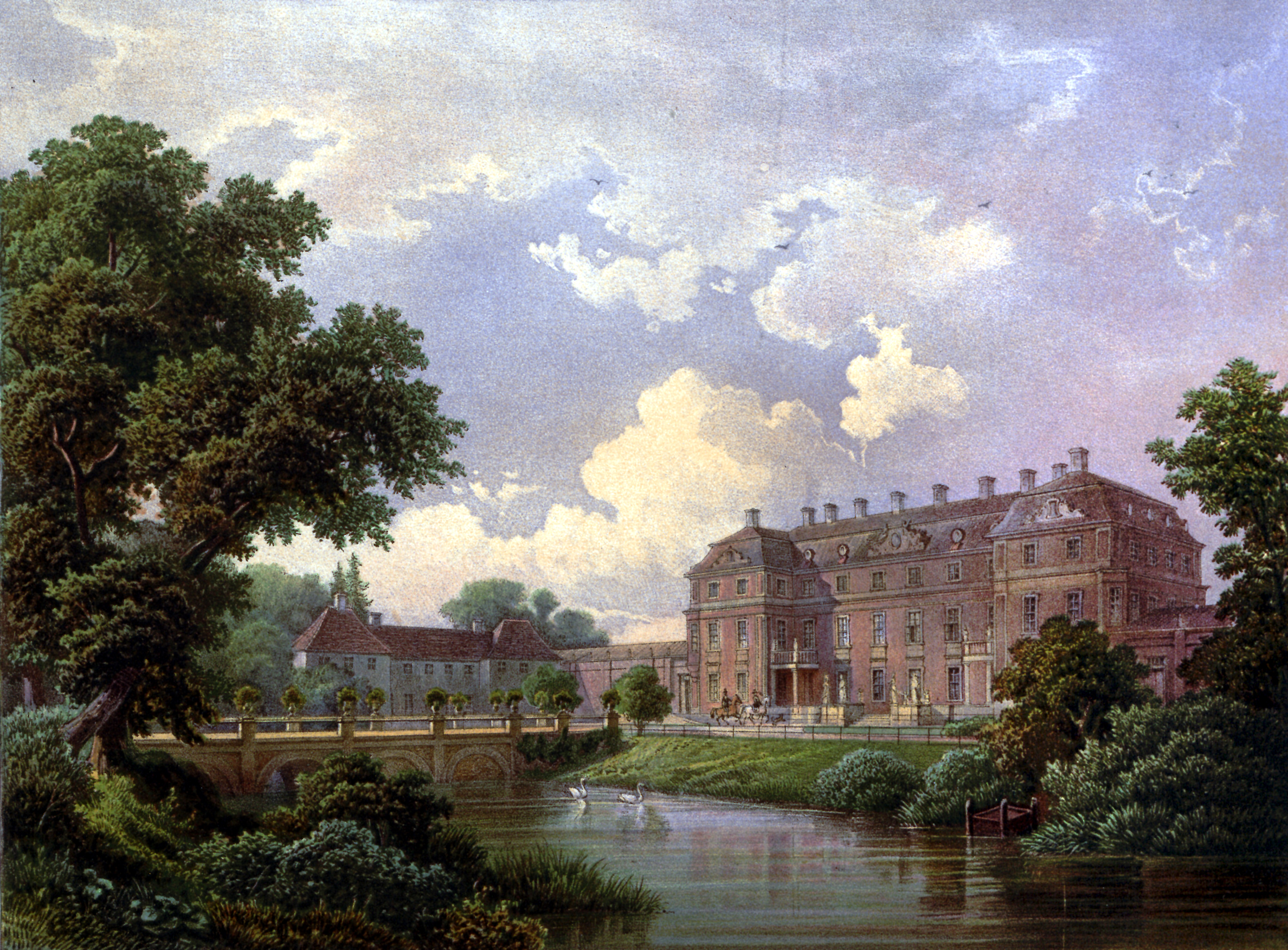 Schloss Schlobitten, Kreis Preußisch Holland, Provinz Preussen